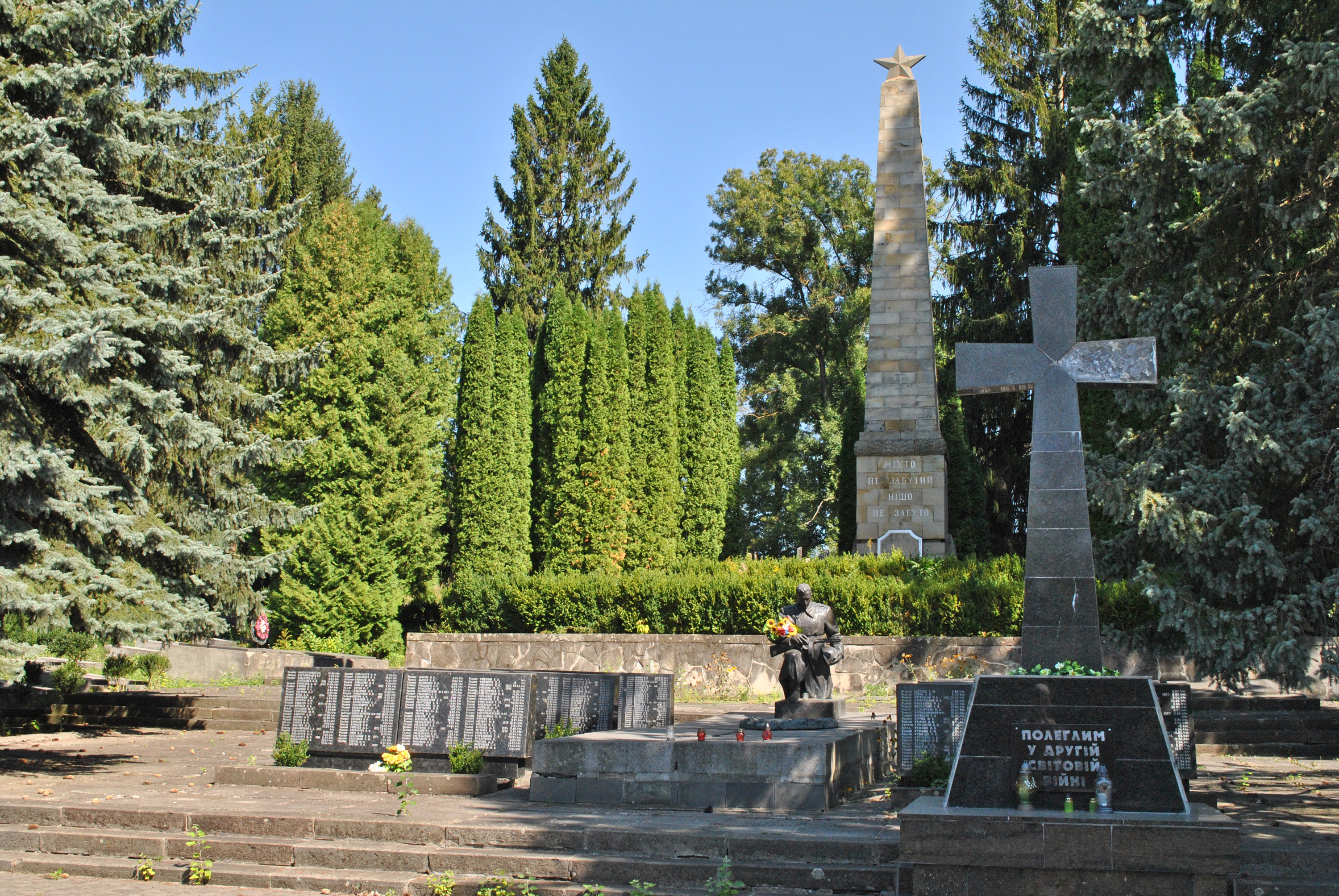 Військове кладовище: братські могили воїнів Радянської армії (17), могили воїнів Радянської армії (308). Тернопіль, вул. Микулинецька, 29, Микулинецький цвинтар.